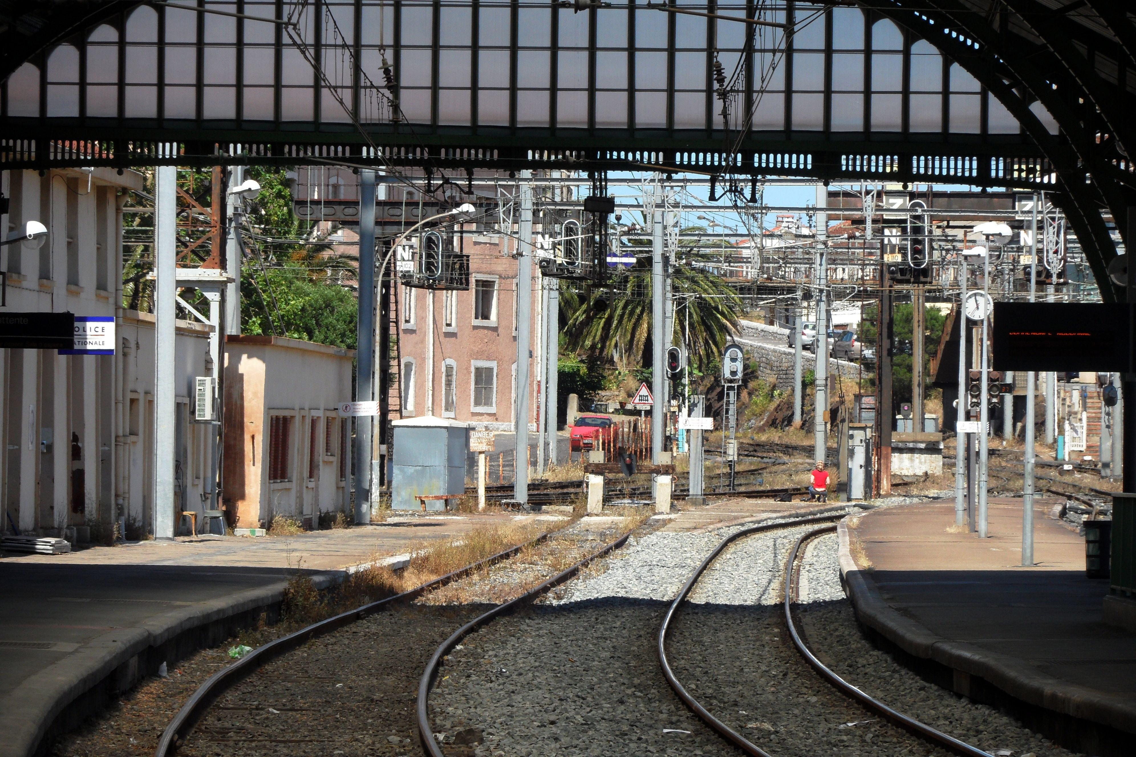 Links das hinter der Halle stumpf endende Breit-, rechts eins der Regelspurbahnsteiggleise. Für Reisezüge auf Breitspur besteht hier keine Umsetzmöglichkeit.